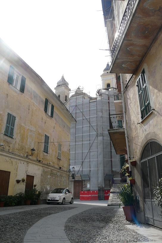 Chiesa dei Santi Pietro e Paolo, Ceriana, Liguria, Italia